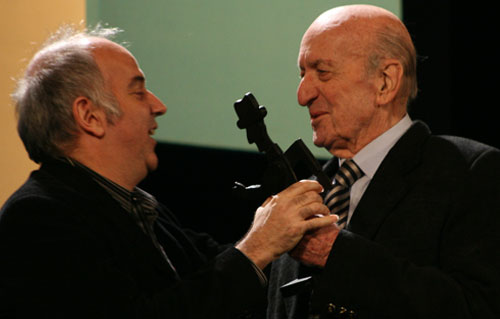 (Izquierda) Esteban Morgado entrega premio a Eduardo Falú